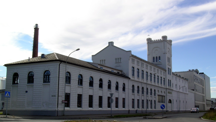 EC Dahls brewery, Trondheim, Norway.